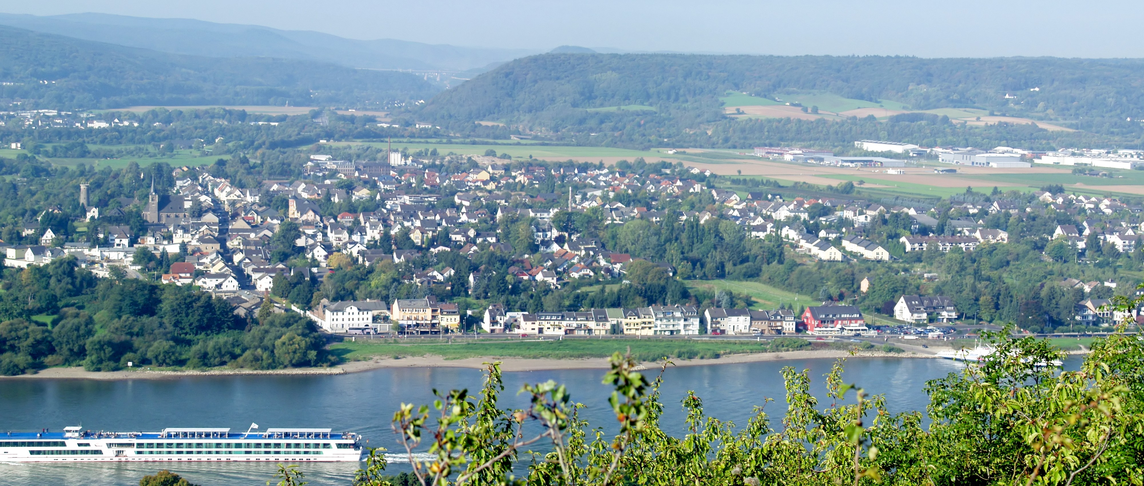 Kripp, Stadtteil von Remagen, vom Kaiserberg in Linz am Rhein auf der anderen Rheinseite aus gesehen